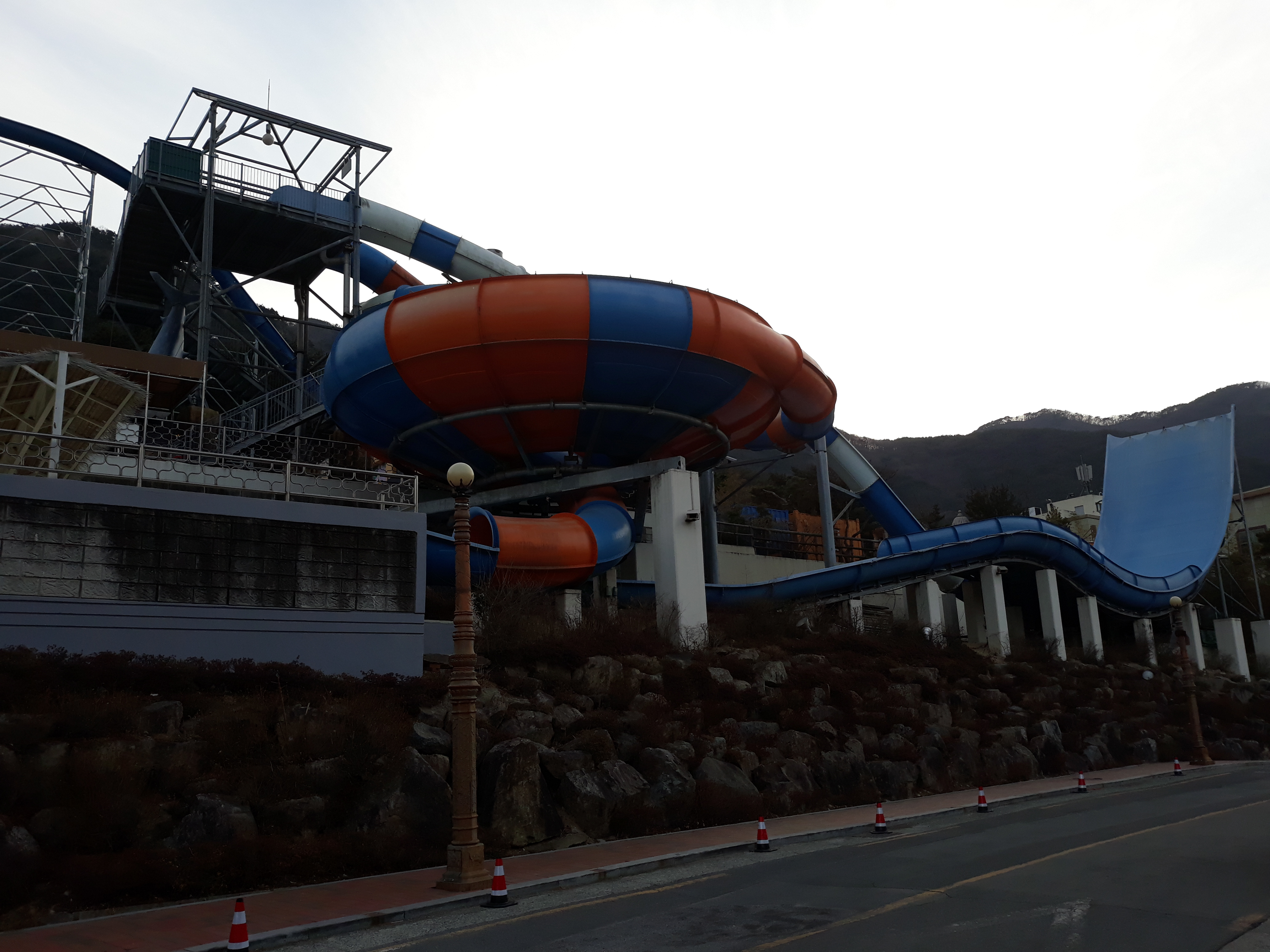 광장에서 바라본 스파밸리 야외 워터파크 전경